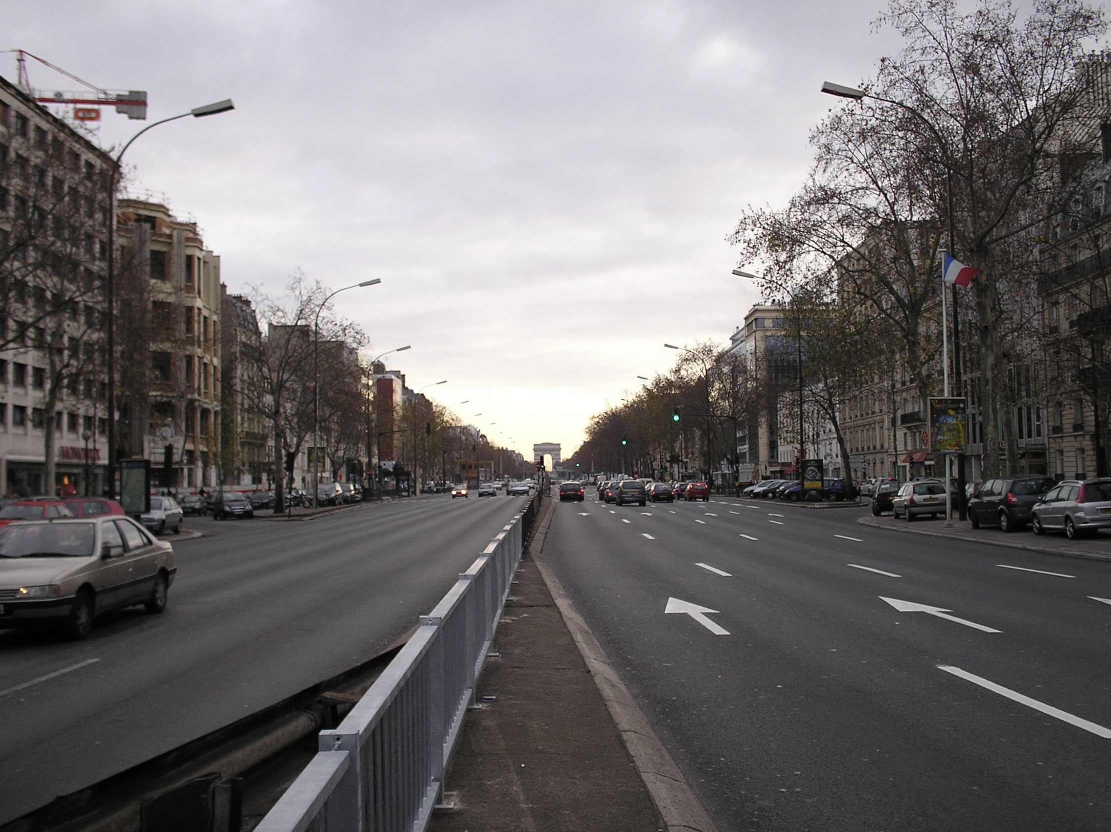 Vue de l'avenue Charles de Gaulle à Neuilly, direction l'Arc de triomphe